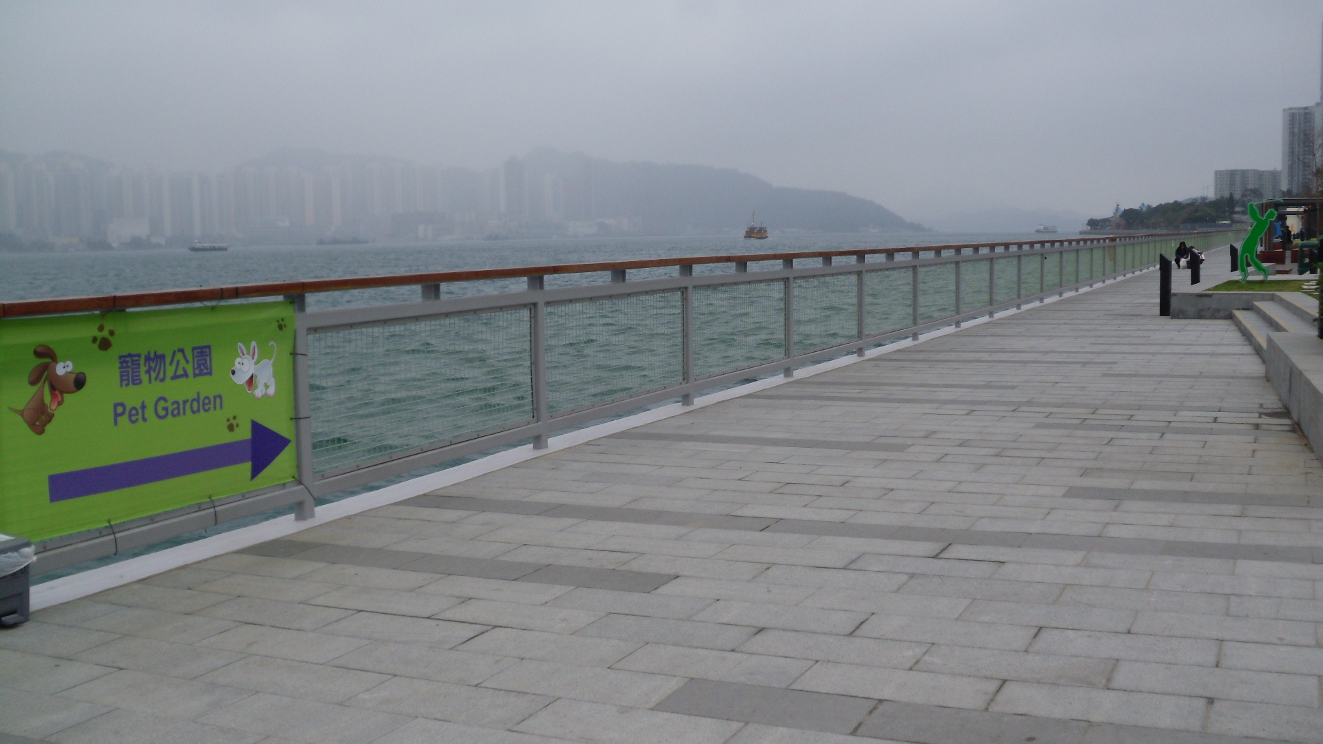 粵語: 寵物公園01